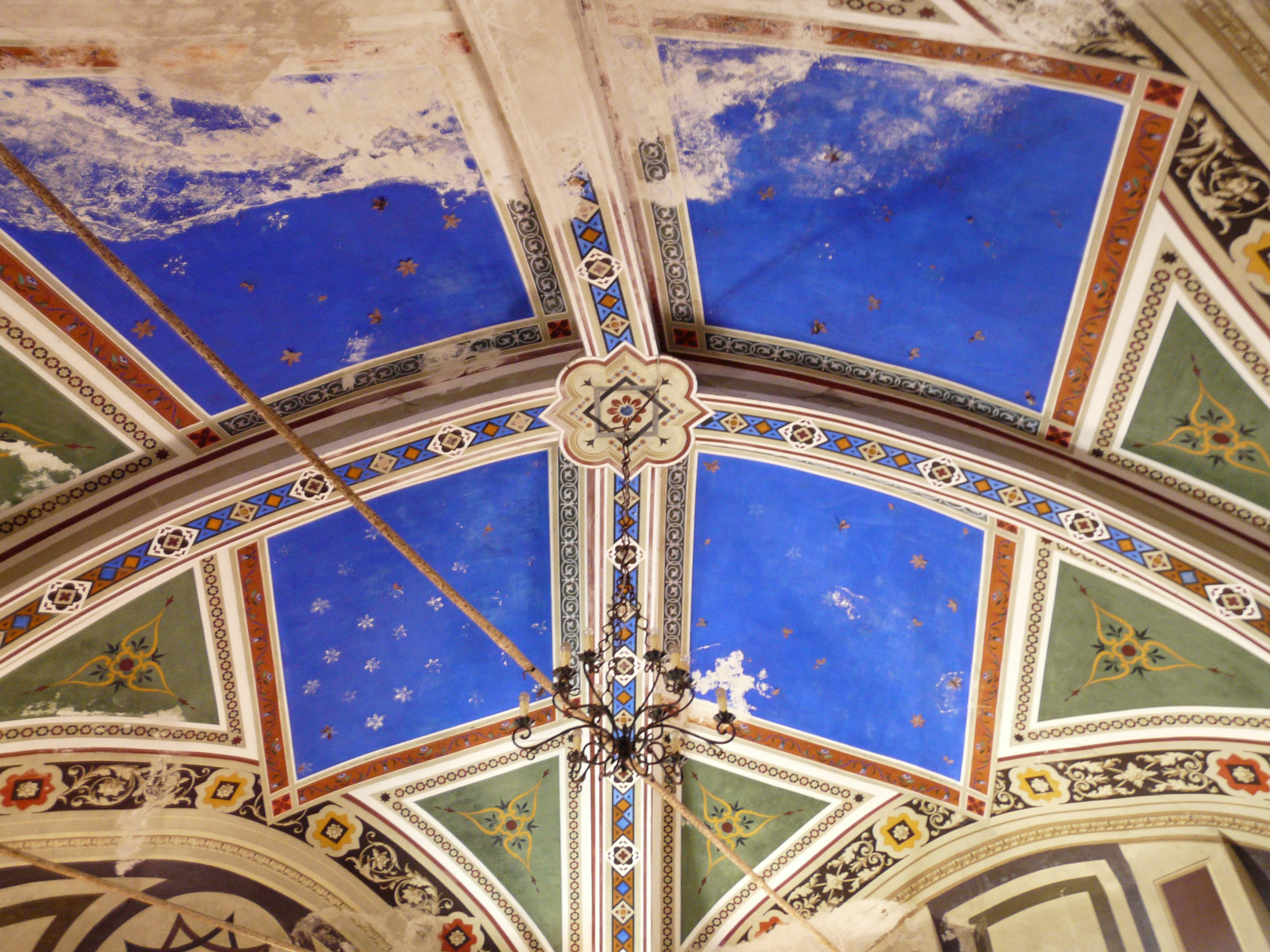 Santuario di Nostra Signora della Misericordia, Mallare, Liguria, Italia